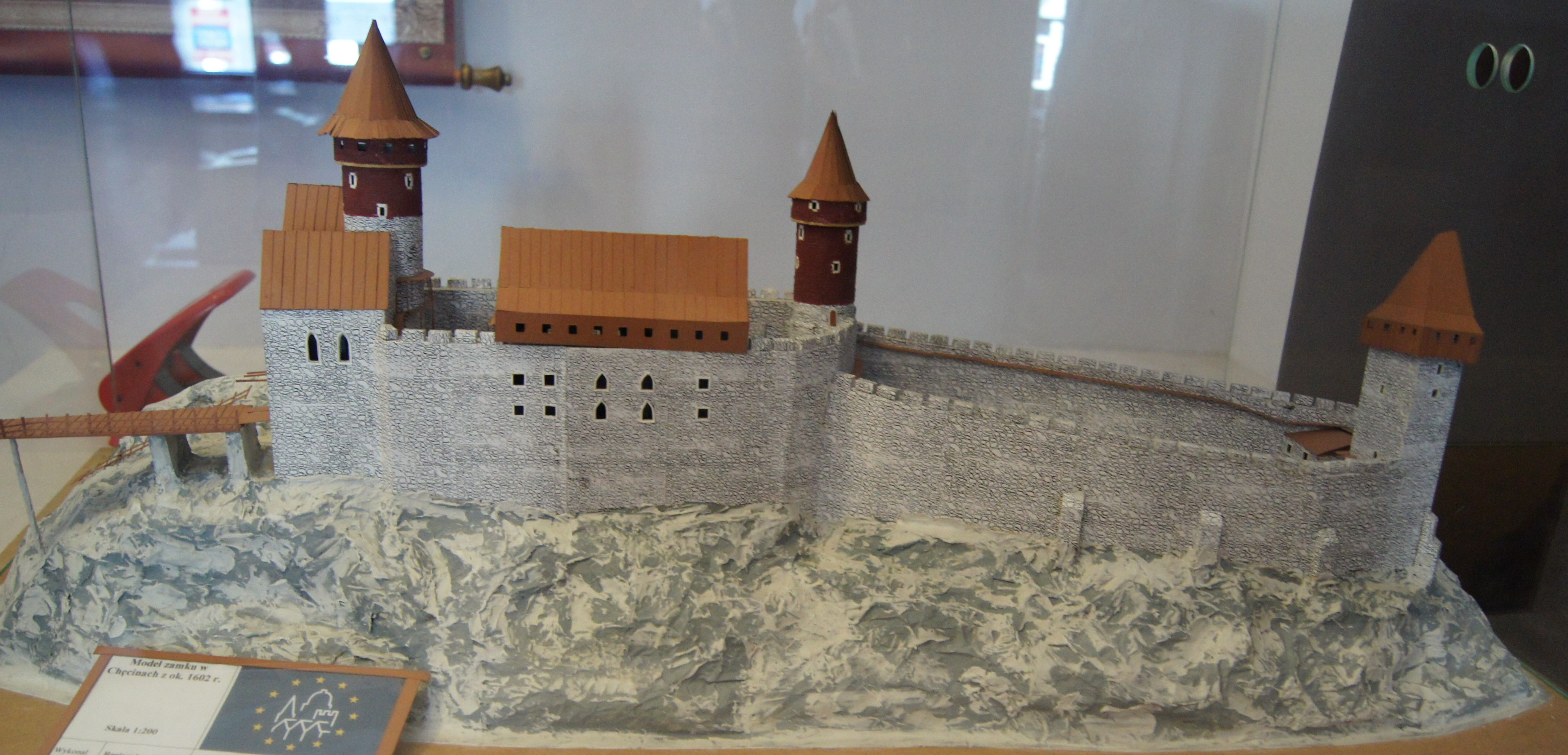 Rekonstrukcja średniowiecznego wyglądu zamku w Chęcinach wg J. Janczykowskiego i D. Czapczyńskiej